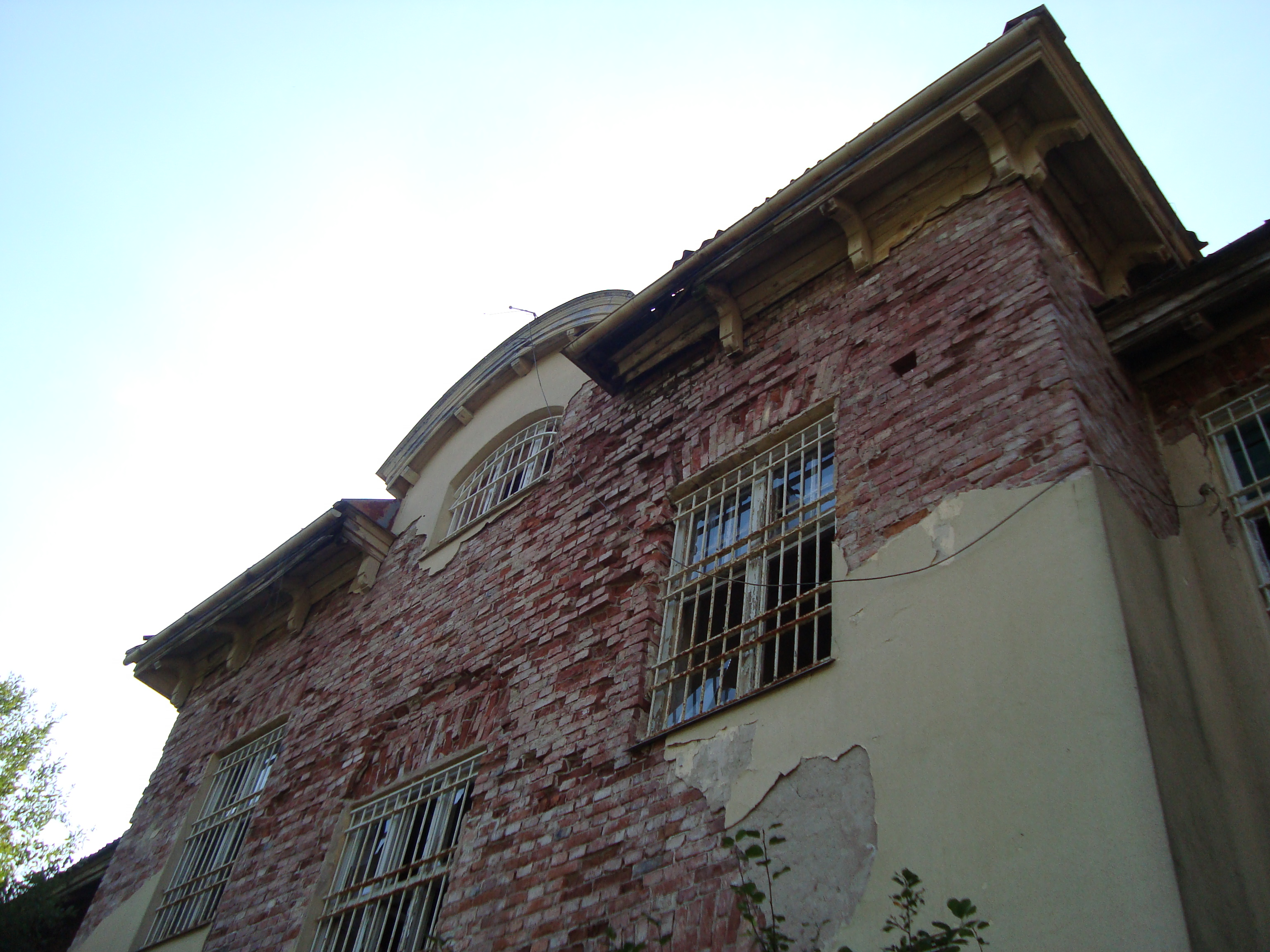 Old mental hospital ("Säters mentalsjukhus") area Skönvik, Säter, Sweden